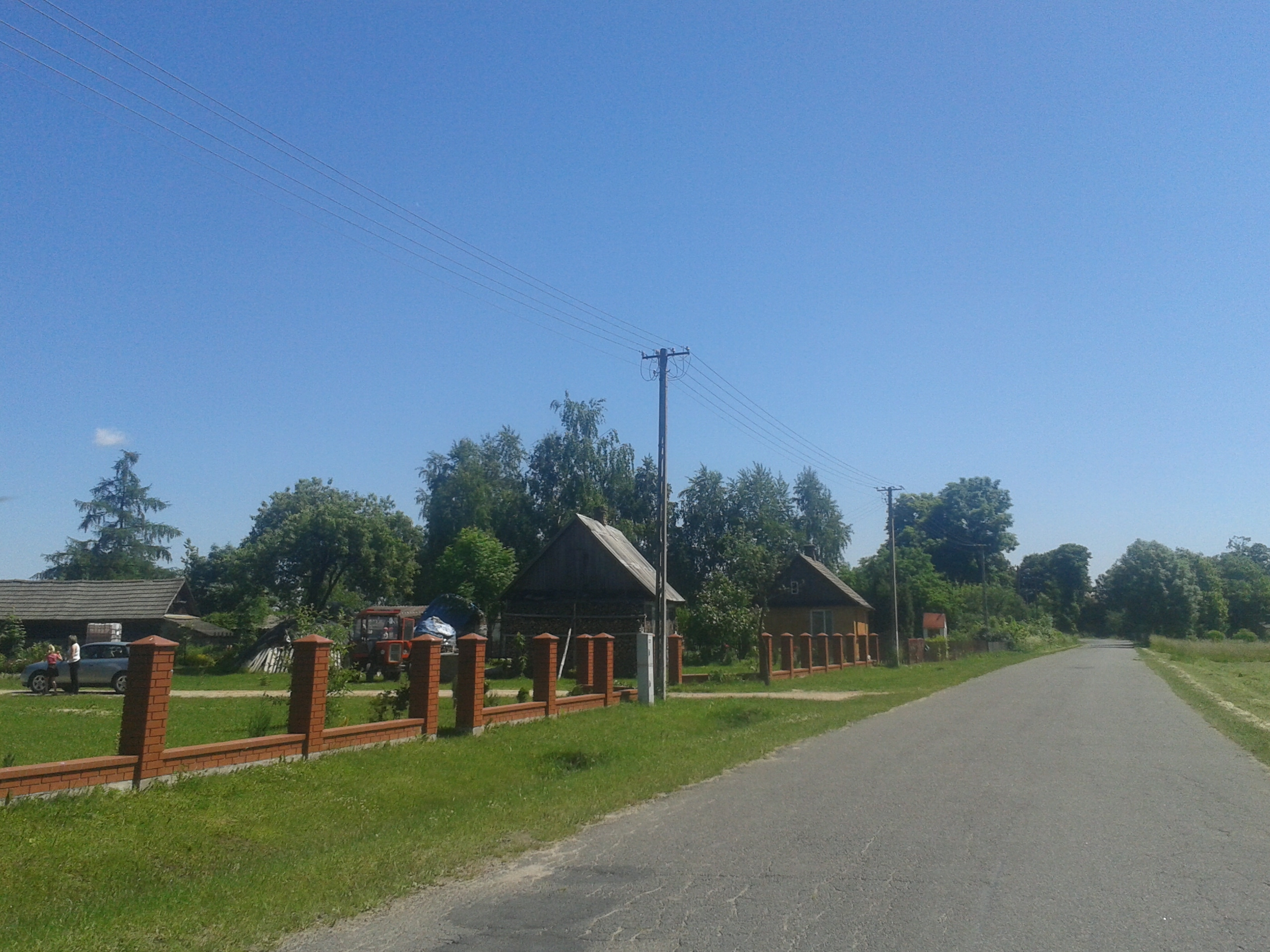 Widok ogólny wsi Olszyn